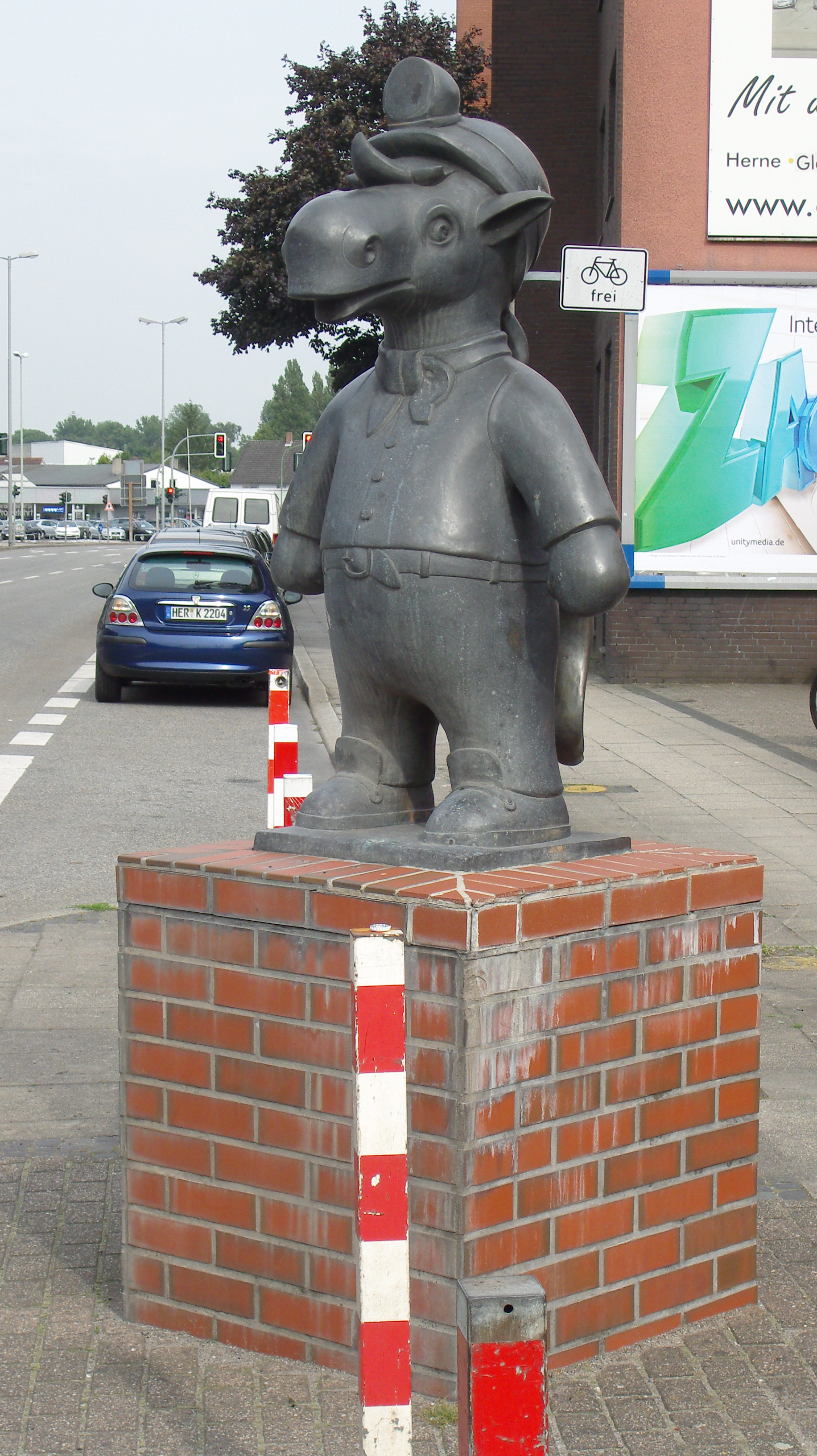 Symbolfigur "Fritz" der Cranger Kirmes, einem Emscherbrücher Dickkopp nachempfunden [1]